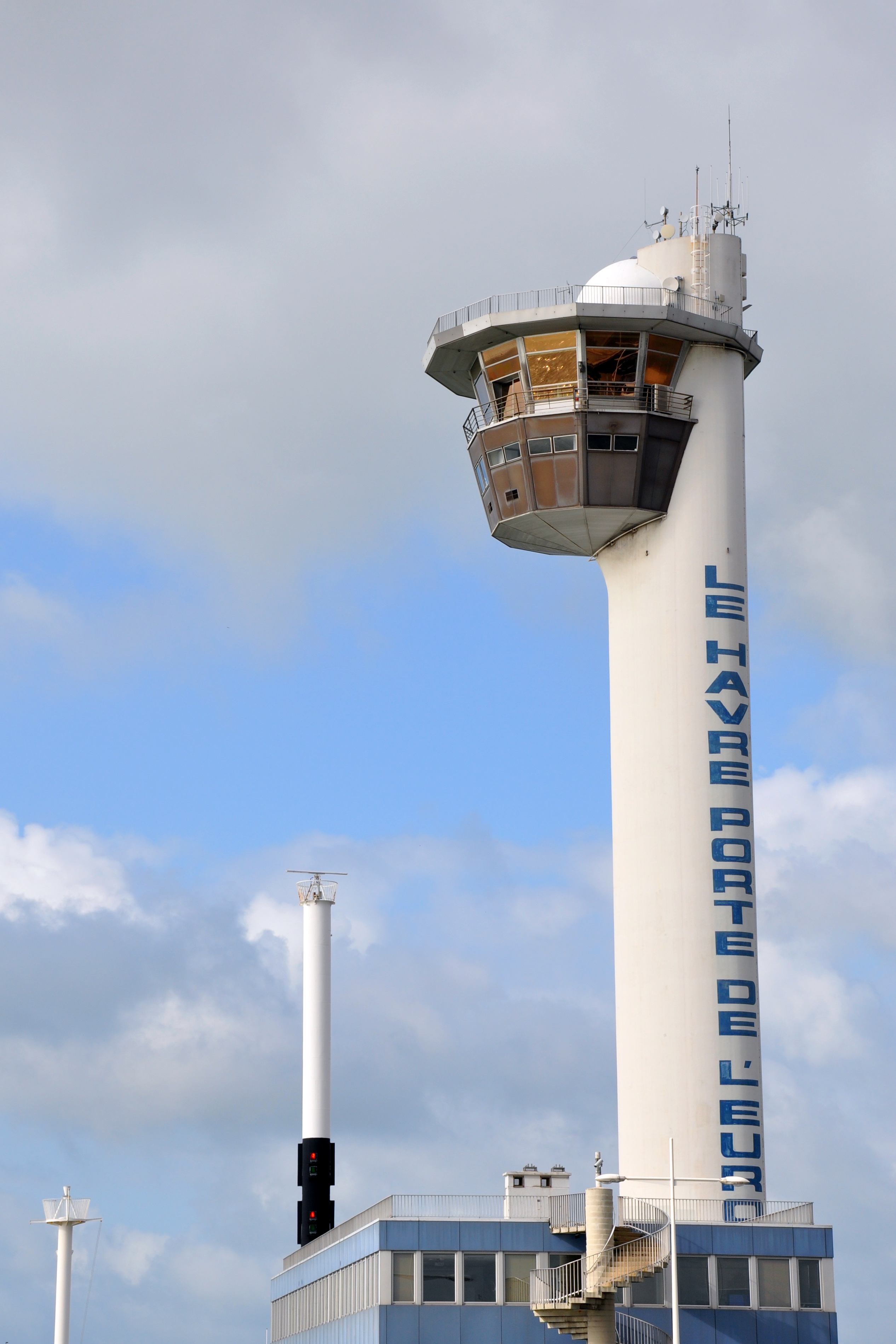 Tour du port du Havre.